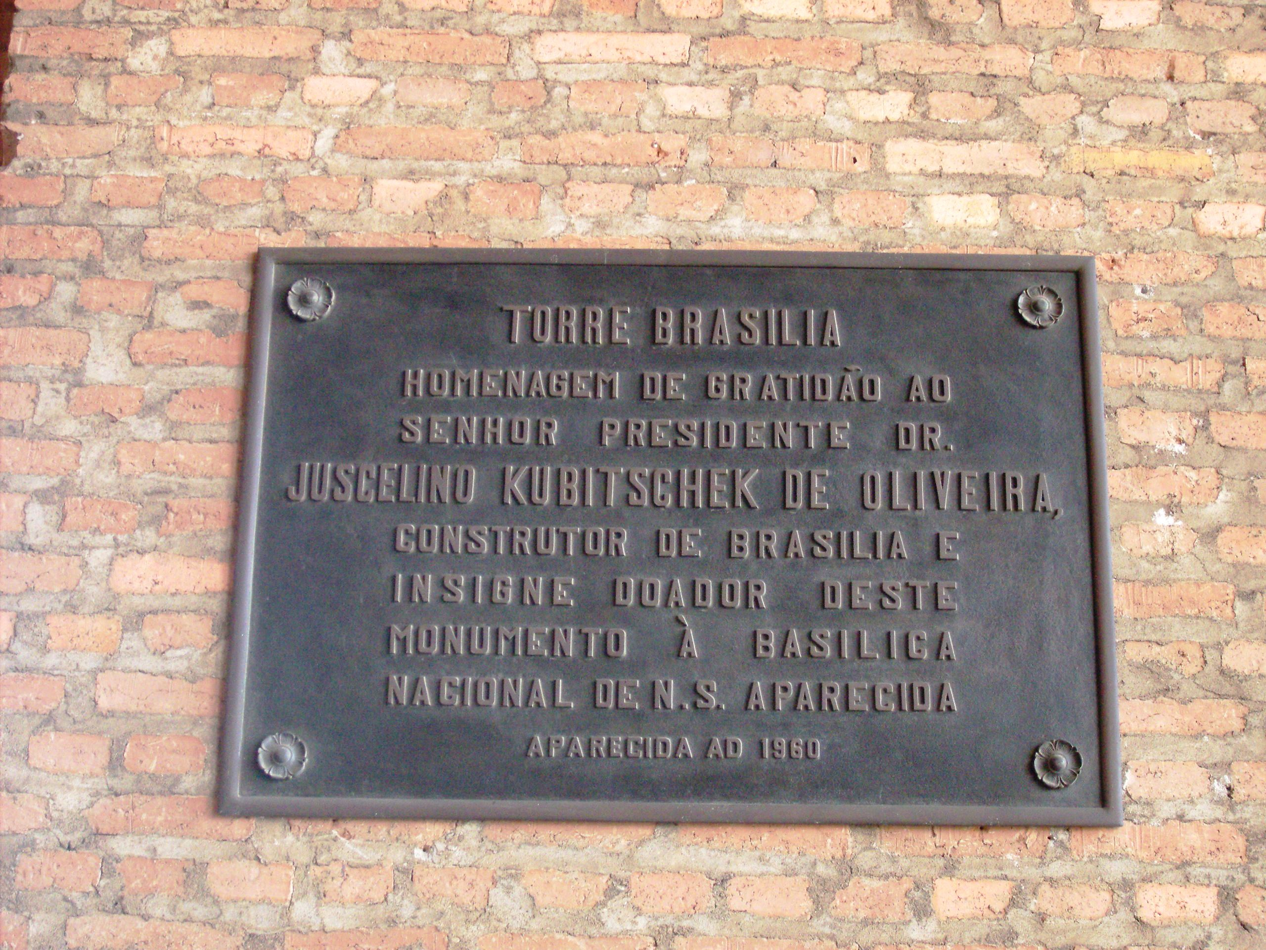 Placa da "Torre Brasília" homenageando o então Presidente Juscelino Kubitschek, 1960.